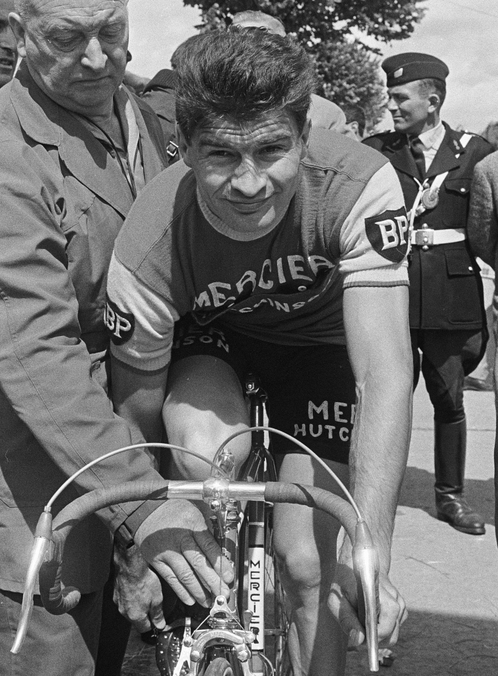 Collectie / Archief : Fotocollectie Anefo Reportage / Serie : [ onbekend ] Beschrijving : Tour de France , nummer 20 Poulidor in aktie Datum : 27 juni 1966 Trefwoorden : wielrennen Persoonsnaam : Poulidor, Raymond Fotograaf : Koch, Eric / Anefo Auteursrechthebbende : Nationaal Archief Materiaalsoort : Negatief (zwart/wit) Nummer archiefinventaris : bekijk toegang 2.24.01.05 Bestanddeelnummer : 919-3002